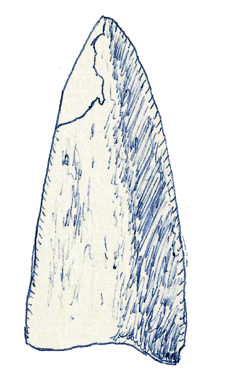 Illustration of a fossil of Mongolosaurus